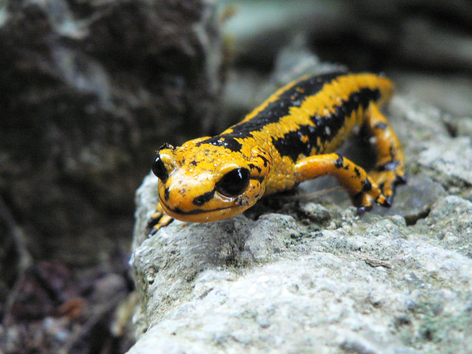 Salamandra común. Ruta del Alba, Asturias.